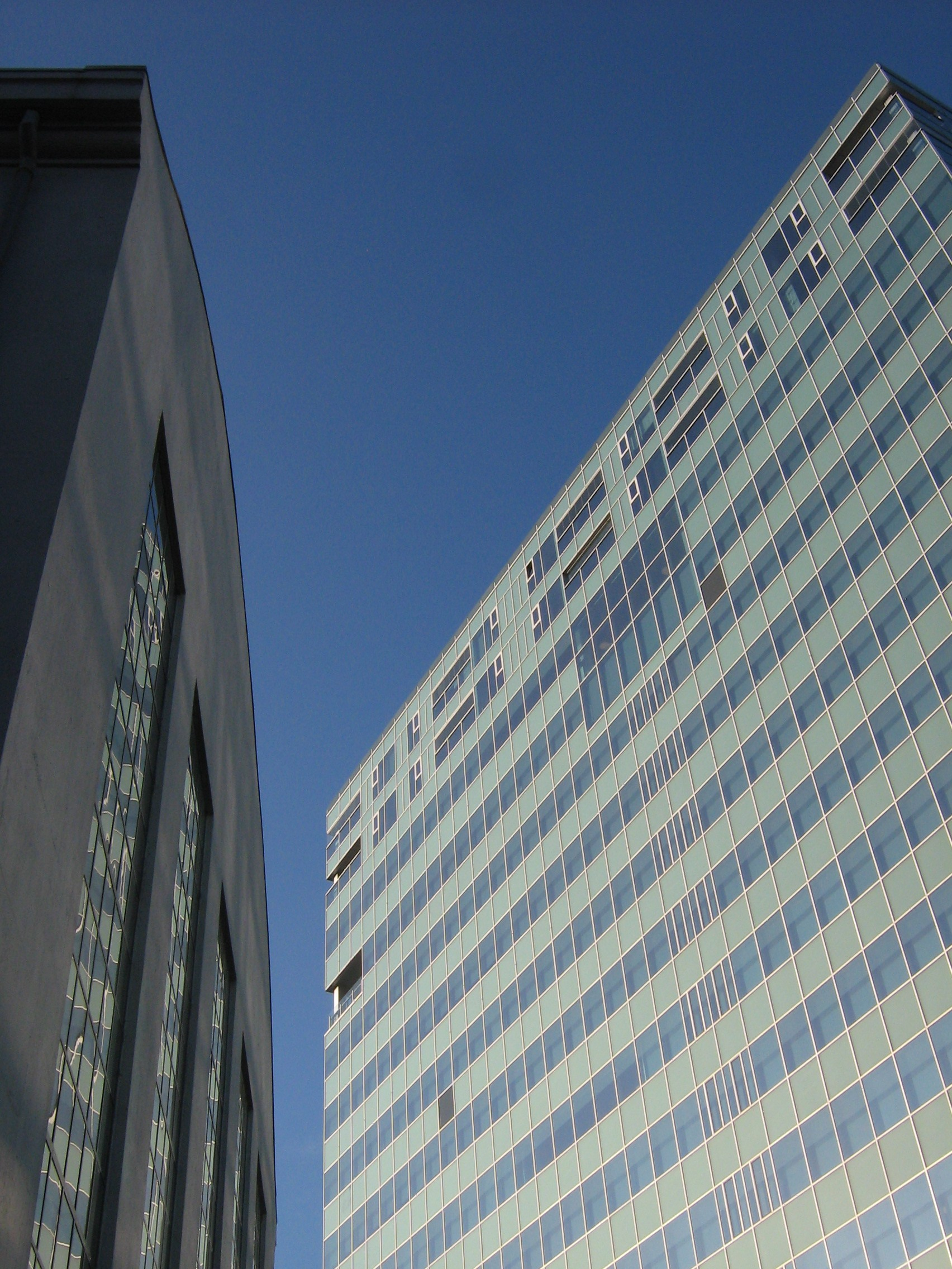 KPMG Huset